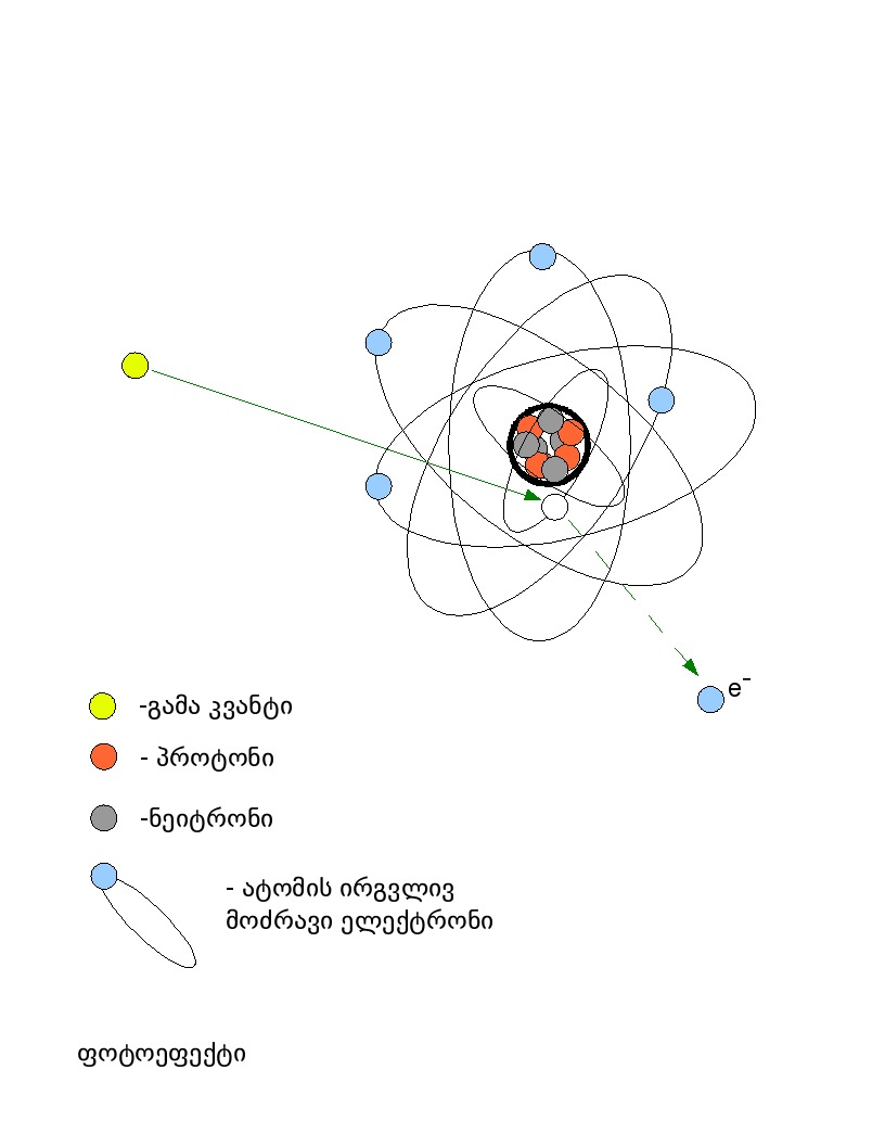 ფოტოეფექტი